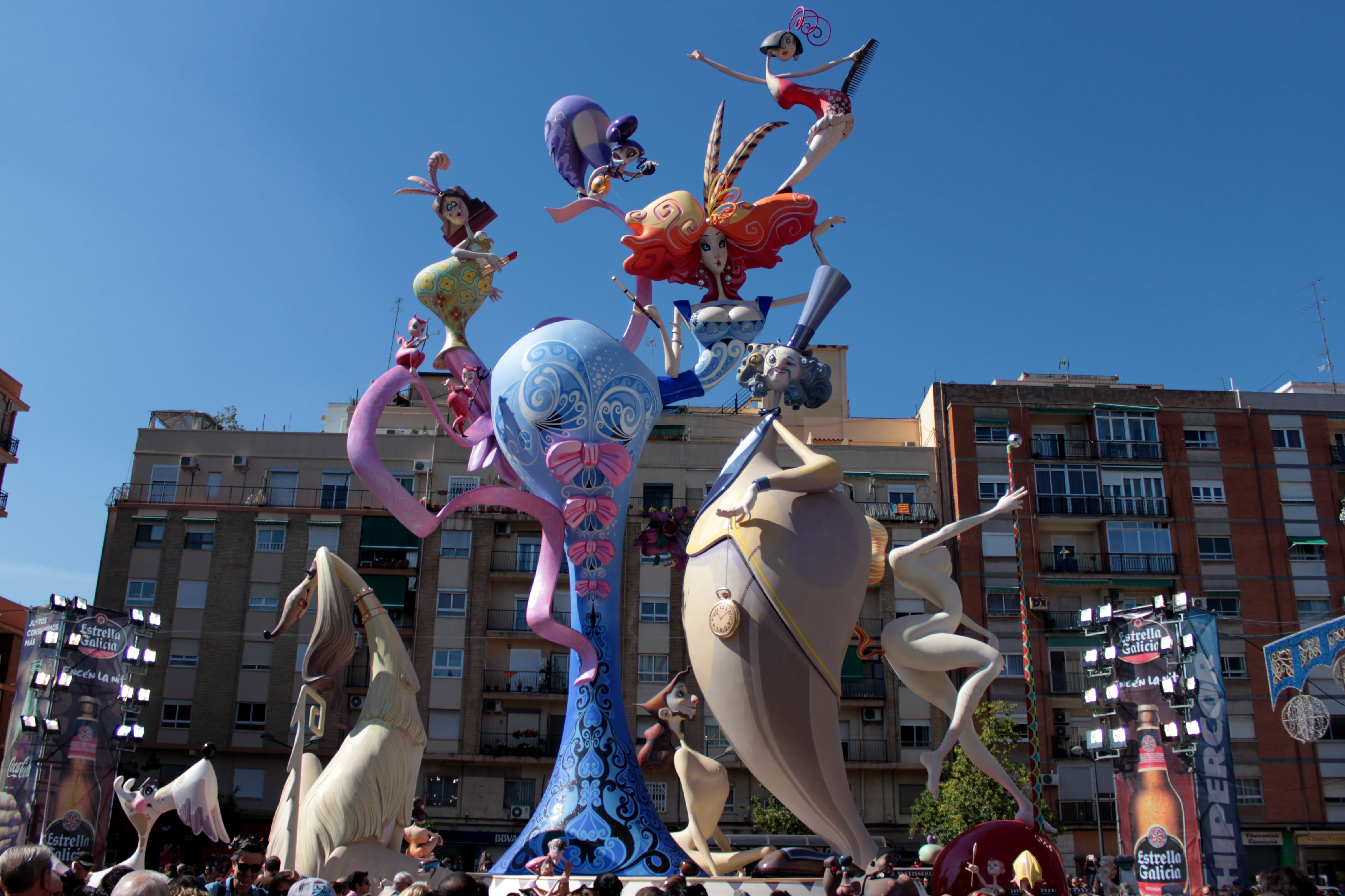 Falla de la L'Antiga de Campanar 2017. Valencia, Comunidad valenciana, España.